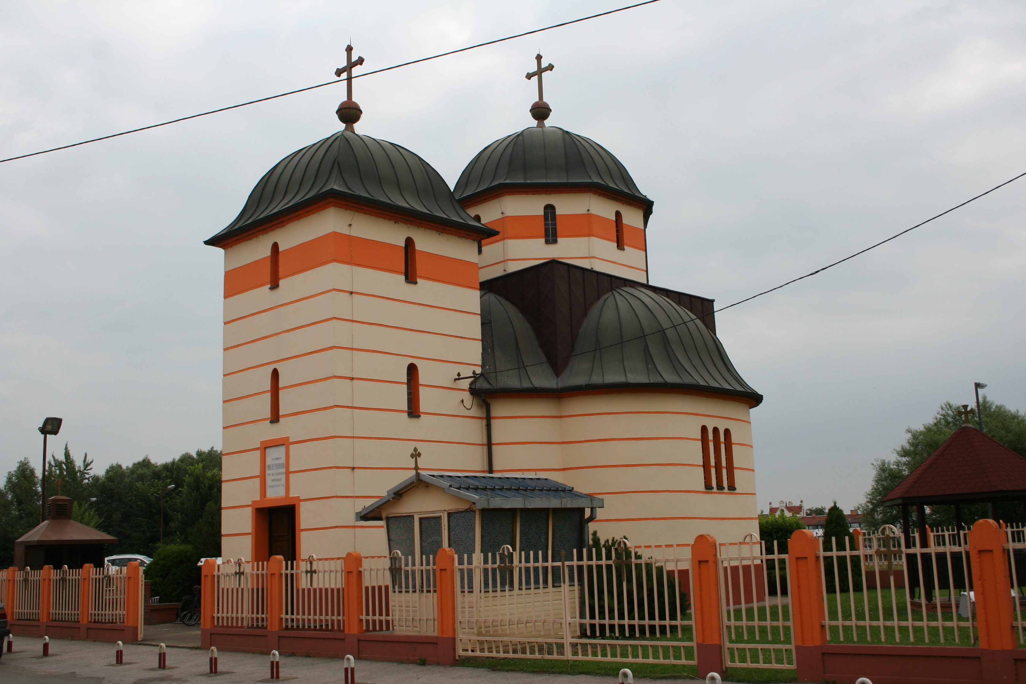 Crkva Prenosa moštiju Sv. Nikolaja, Mačvanska Mitrovica